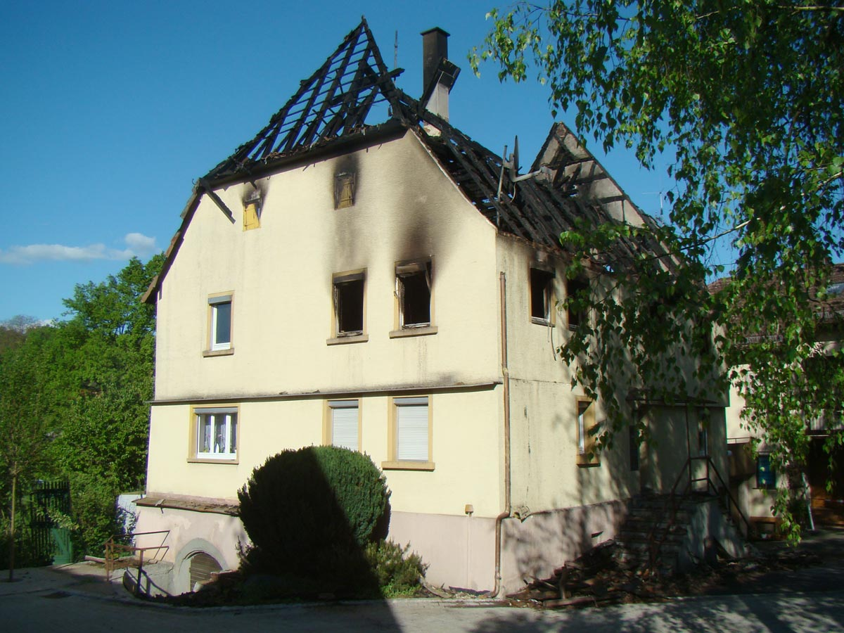 Heilbronn-Biberach, Rappengasse 10, am Nachmittag nach Brand